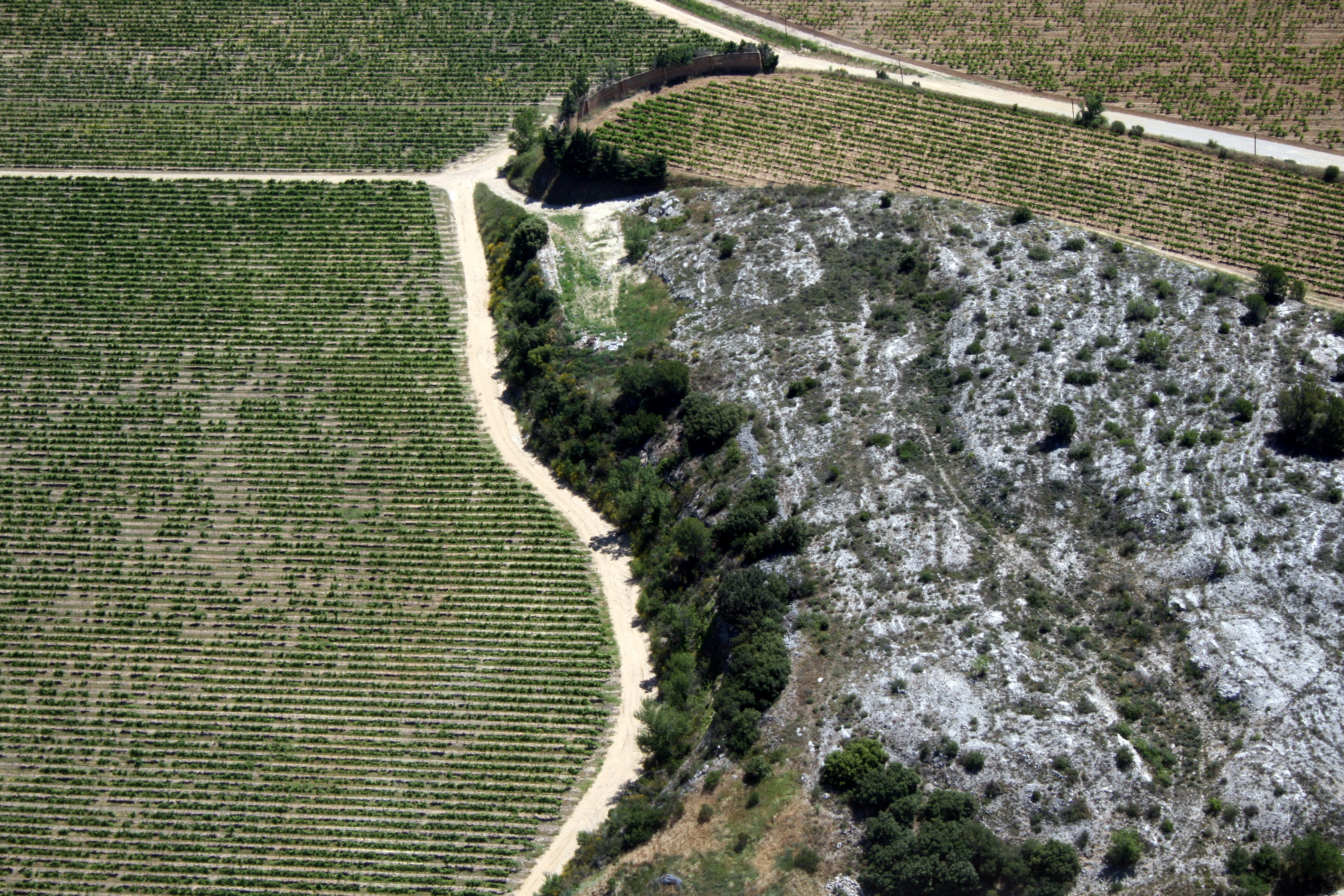 Vignoble de Châteauneuf-du-Pape jouxtant la colline calcaire